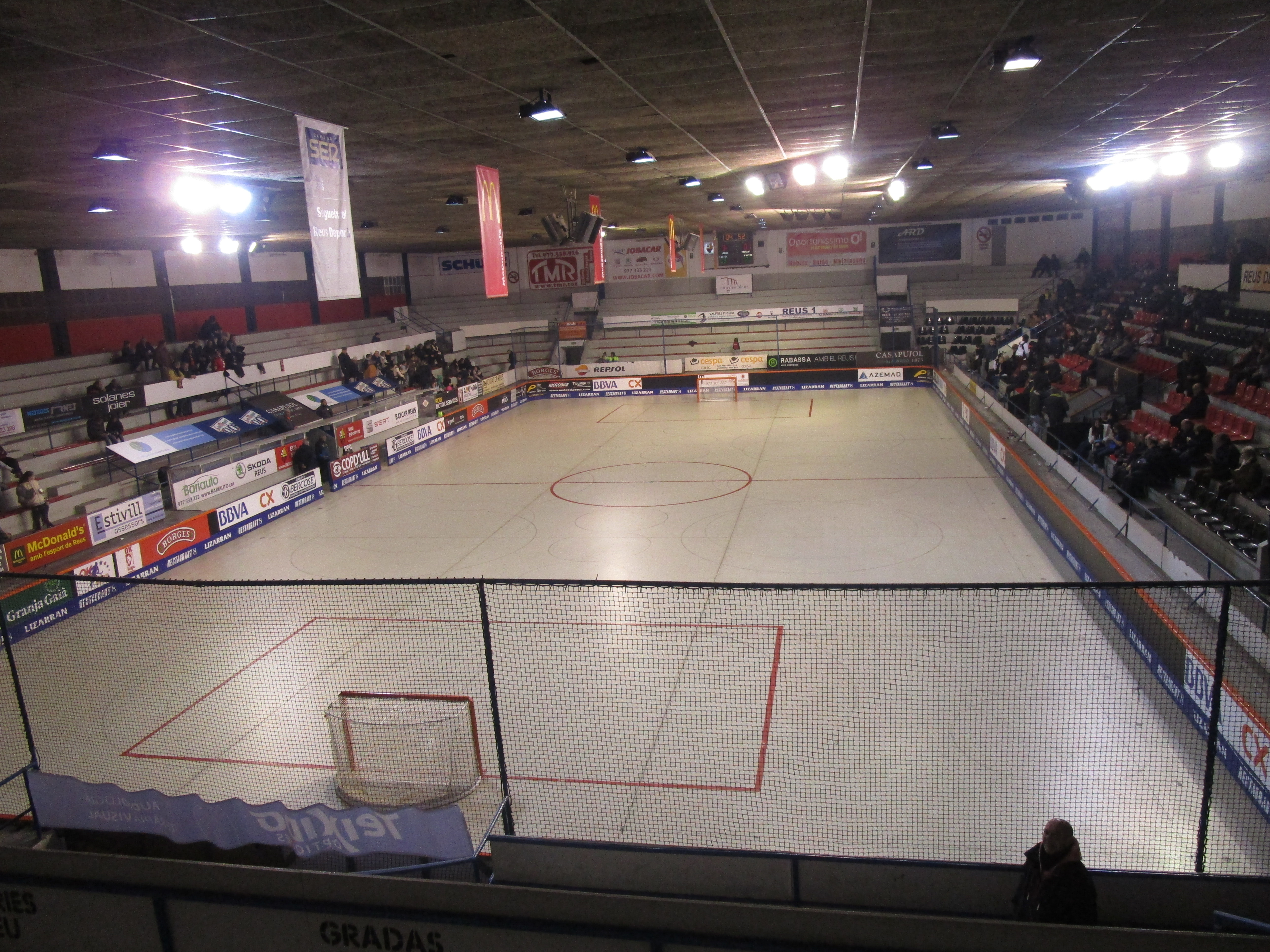 Pabellon del Reus Deportiu de hockey